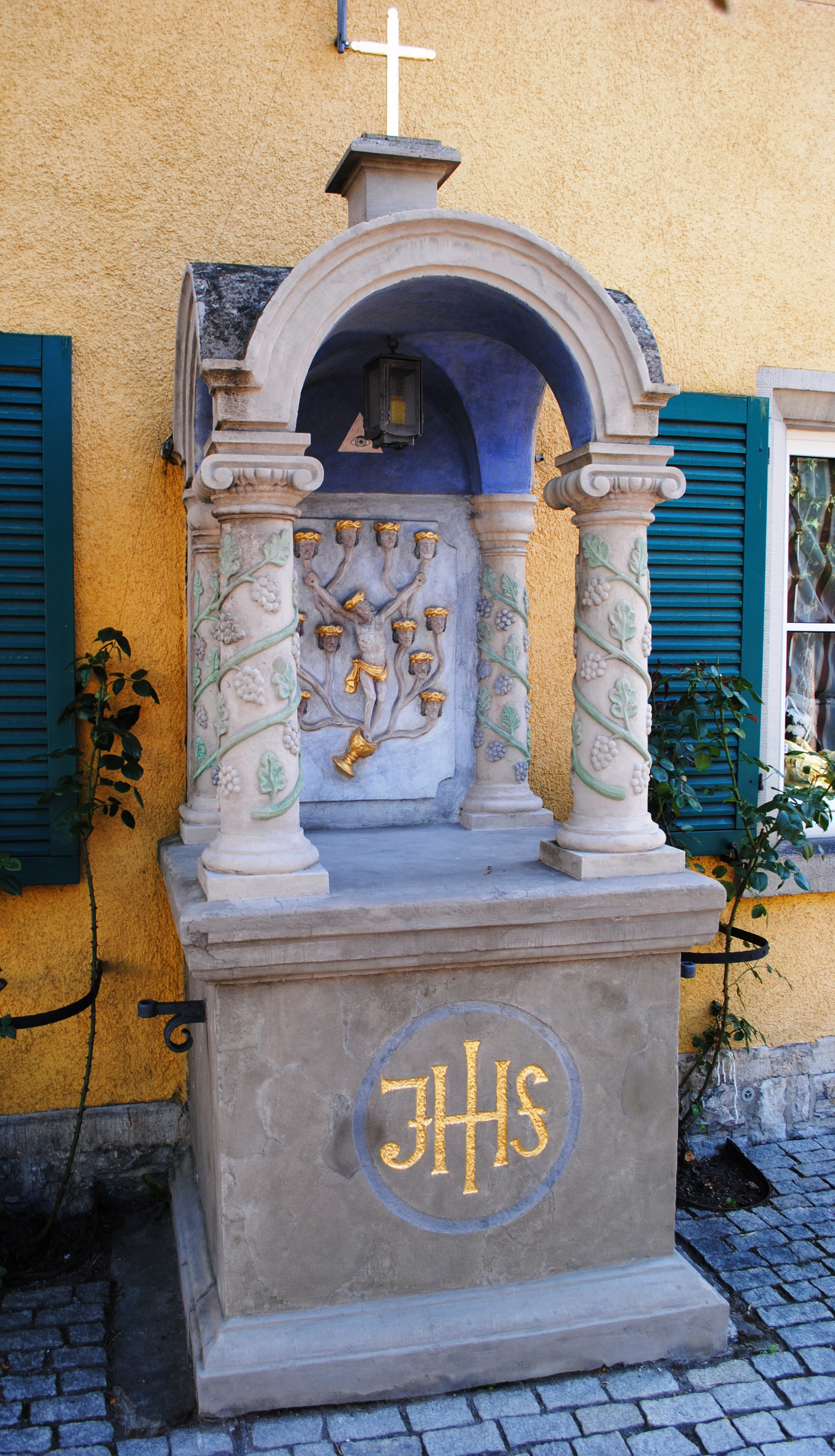 Blutsmarter, Volkach, Altarbildstock